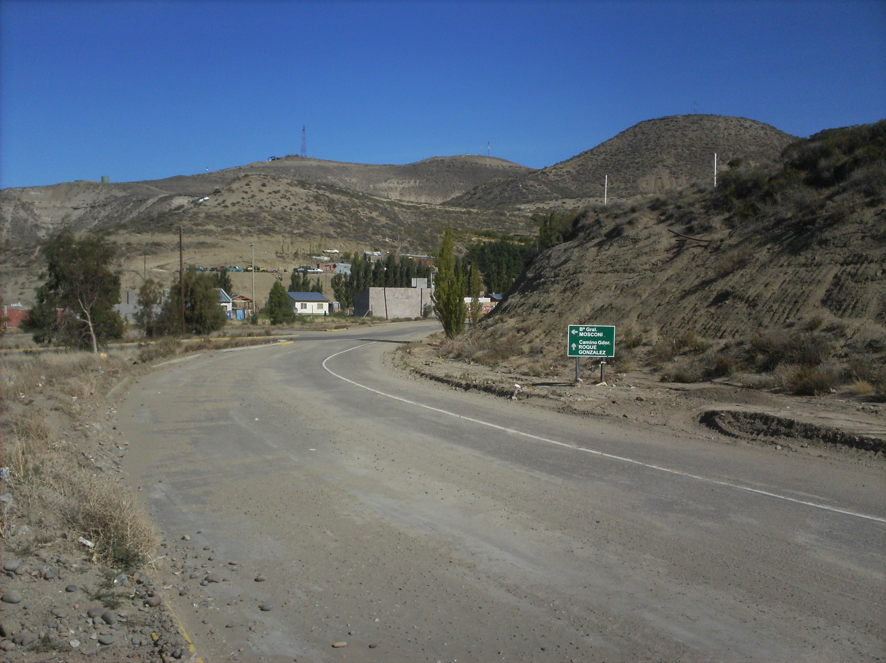 vista del camino alternativo y saavedra